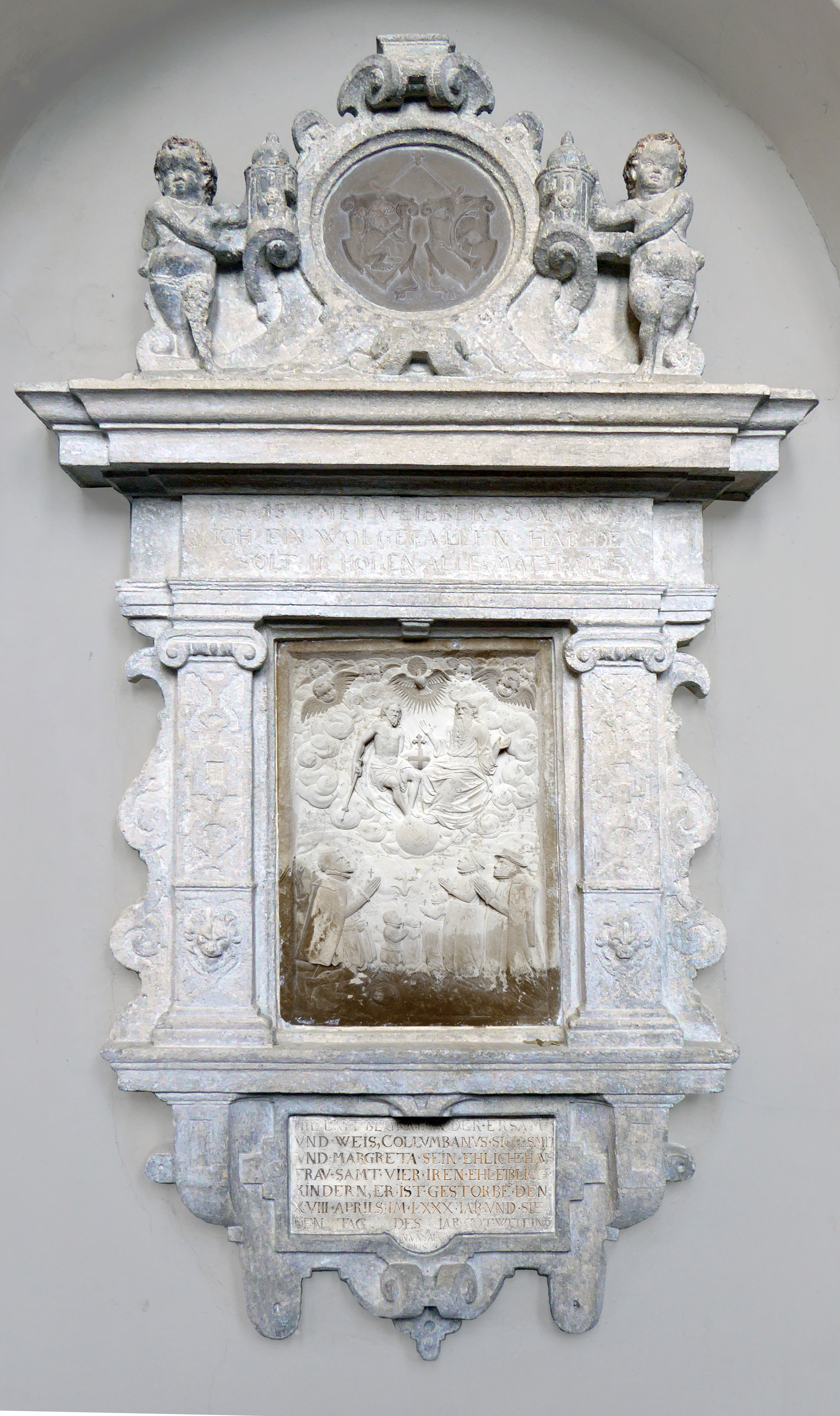 Renaissance - Epitaph des Columbanus Sichelschmiedt (Collumbanus Sichlsmit) (* vor 1542, Imbach, † 18.04.1580, Imbach) und seinen Kindern. Pfarrkirche Imbach (Gemeinde Senftenberg), im Chor Links. Inschrift: HIE * LIGT * BEGRABEN * DER * ERSAM * / VND * WEIS, COLLVMBANVS * SICHLSMIT / VND * MARGRETA * SEIN * EHLICHE* HAVS / FRAV * SAMT * VIER * IREN * EHLEIBLICH / KINDERN; ER * IST * GESTORBE * DEN / XVIII * APRILS * IM * LXXX * IAR, UND * SIE / DEN TAG DES IAR * GOT * WELE * INE / VN, VUS * AL * GNE / DIG SEIN